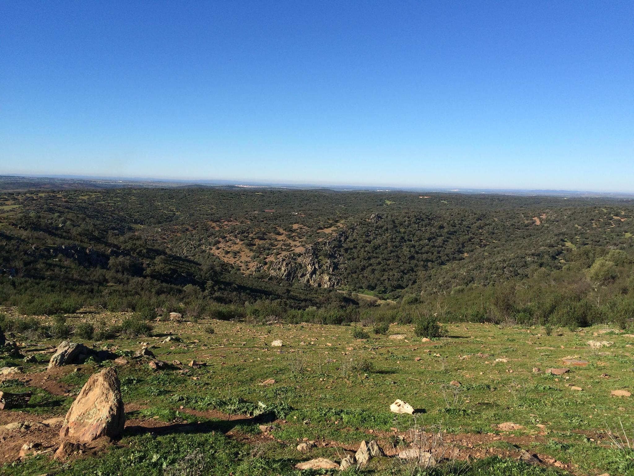 Dehesa desde la ermita de Santa Bárbara